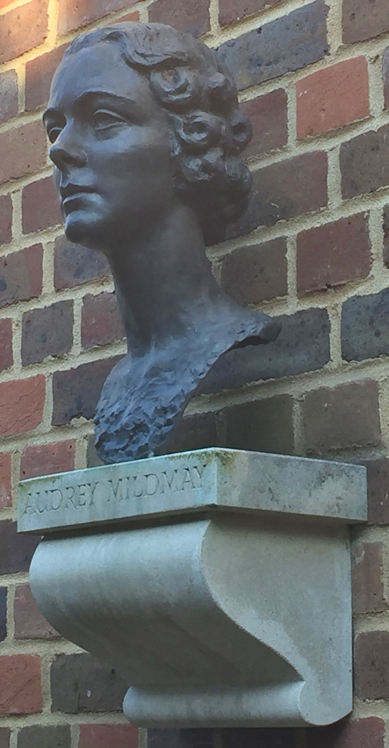 Büste von Audrey Mildmay, Glyndebourne Festival House